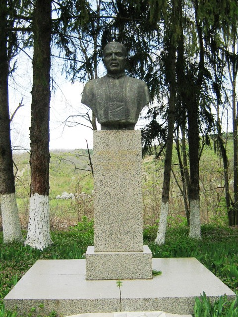 Паметникът на убития партизански ятак Мехмед Ахмедов (Тилки), намиращ се в център на селото. Фото: Вл. Стойков - април 2007 год.